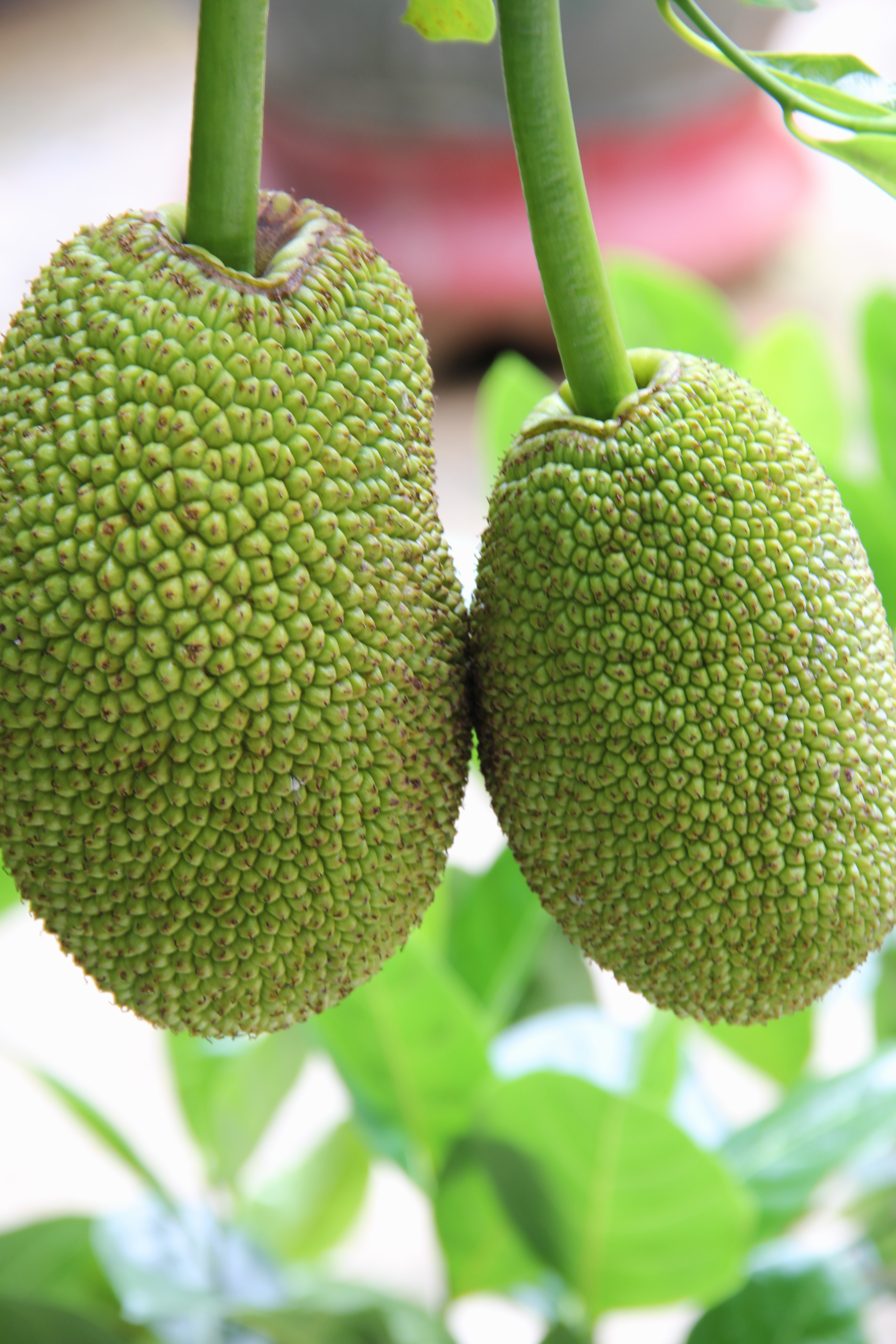 Hình tự chụp về một giống mít Việt Nam